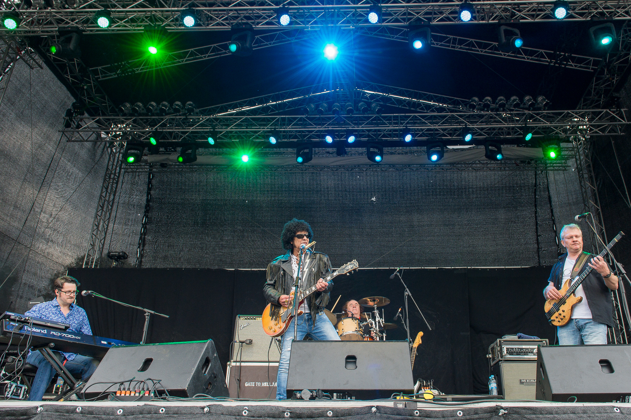 Brombachsee,Concertbüro Franken,Festival,Konzert,Lieder am See,Livekonzert,Livemusik,Mungo Jerry,Musik